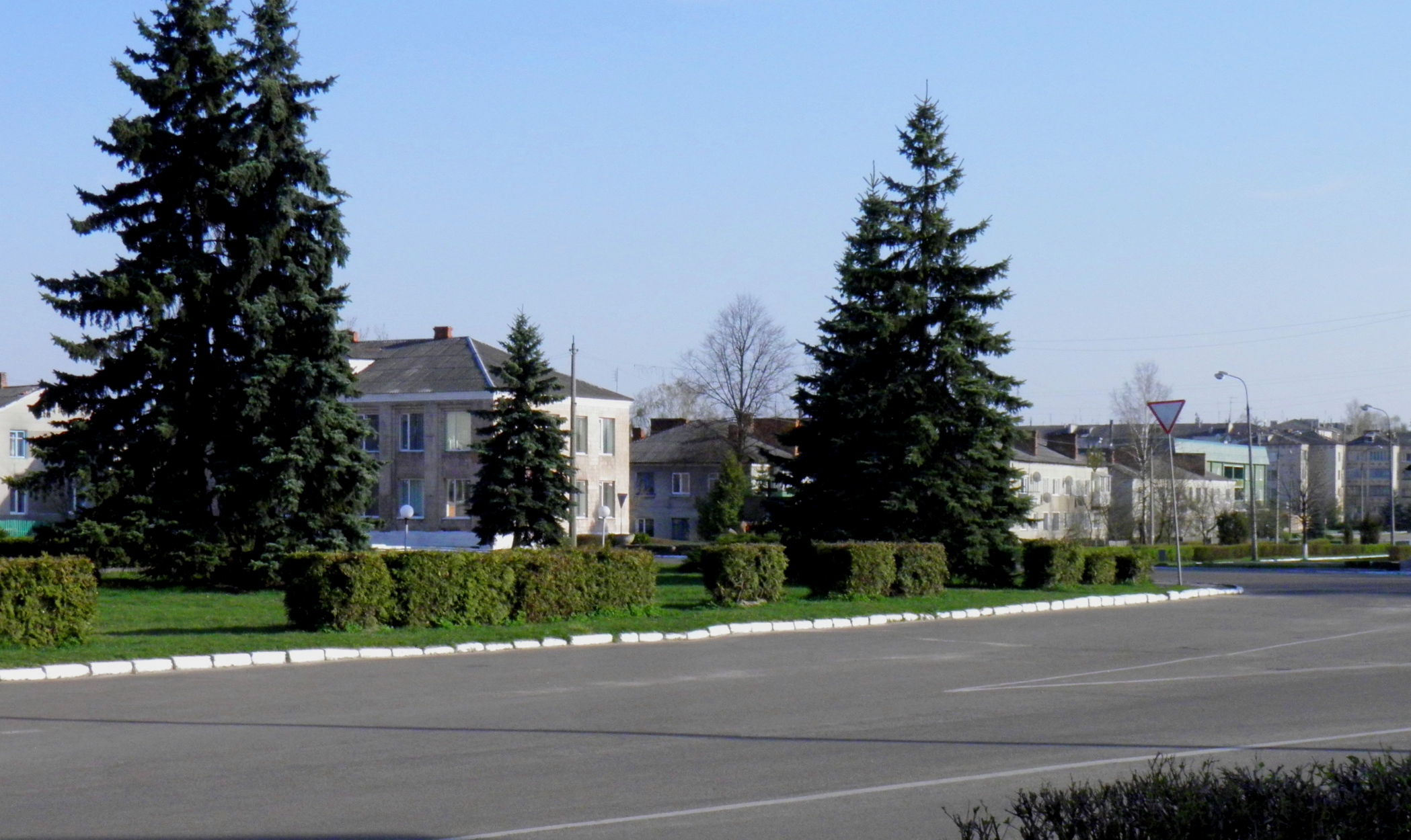 МАневичі. Площа в центрі